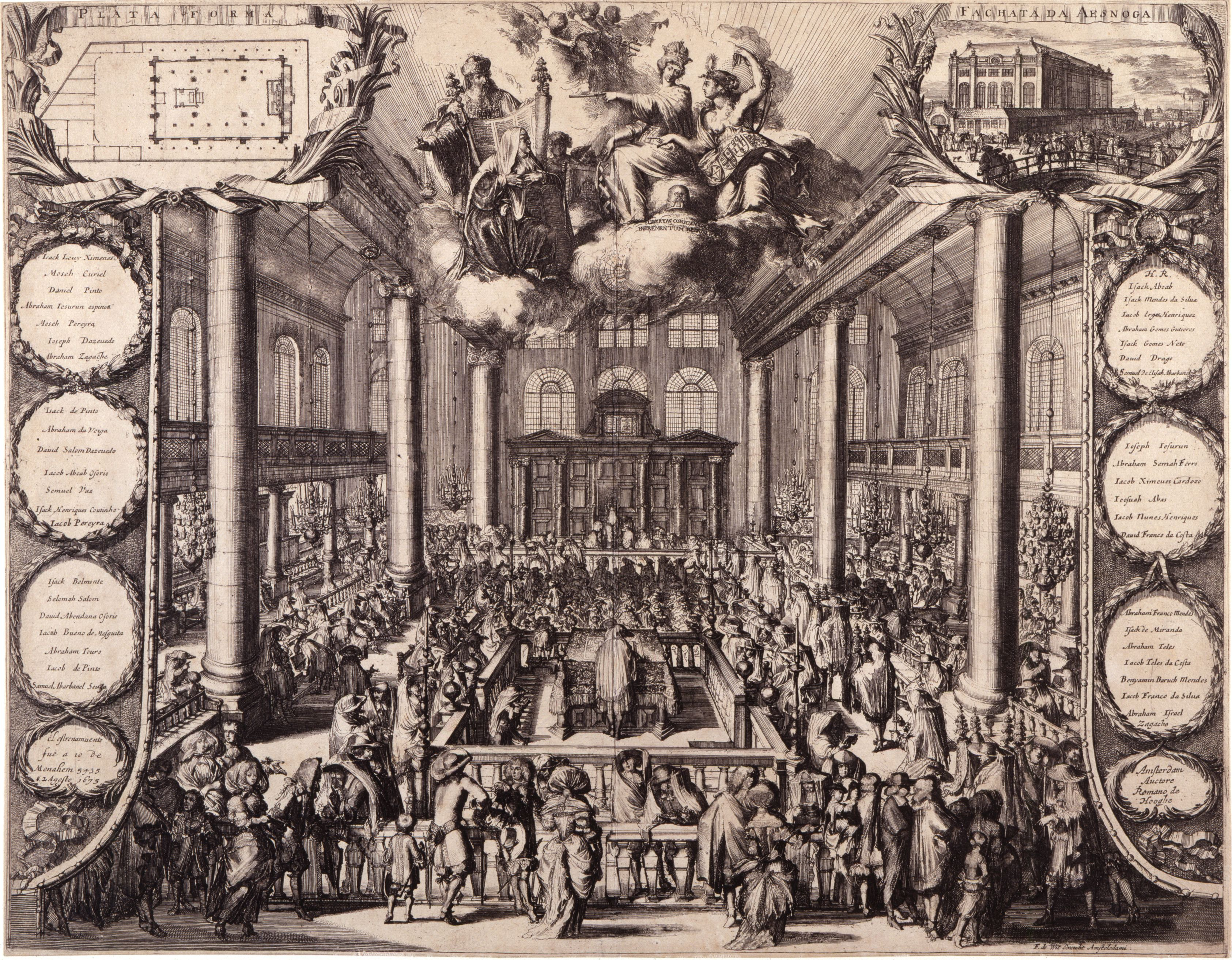 Romeyn de Hooghe: De portugese synagoge te Amsterdam tijdens de inwijding.